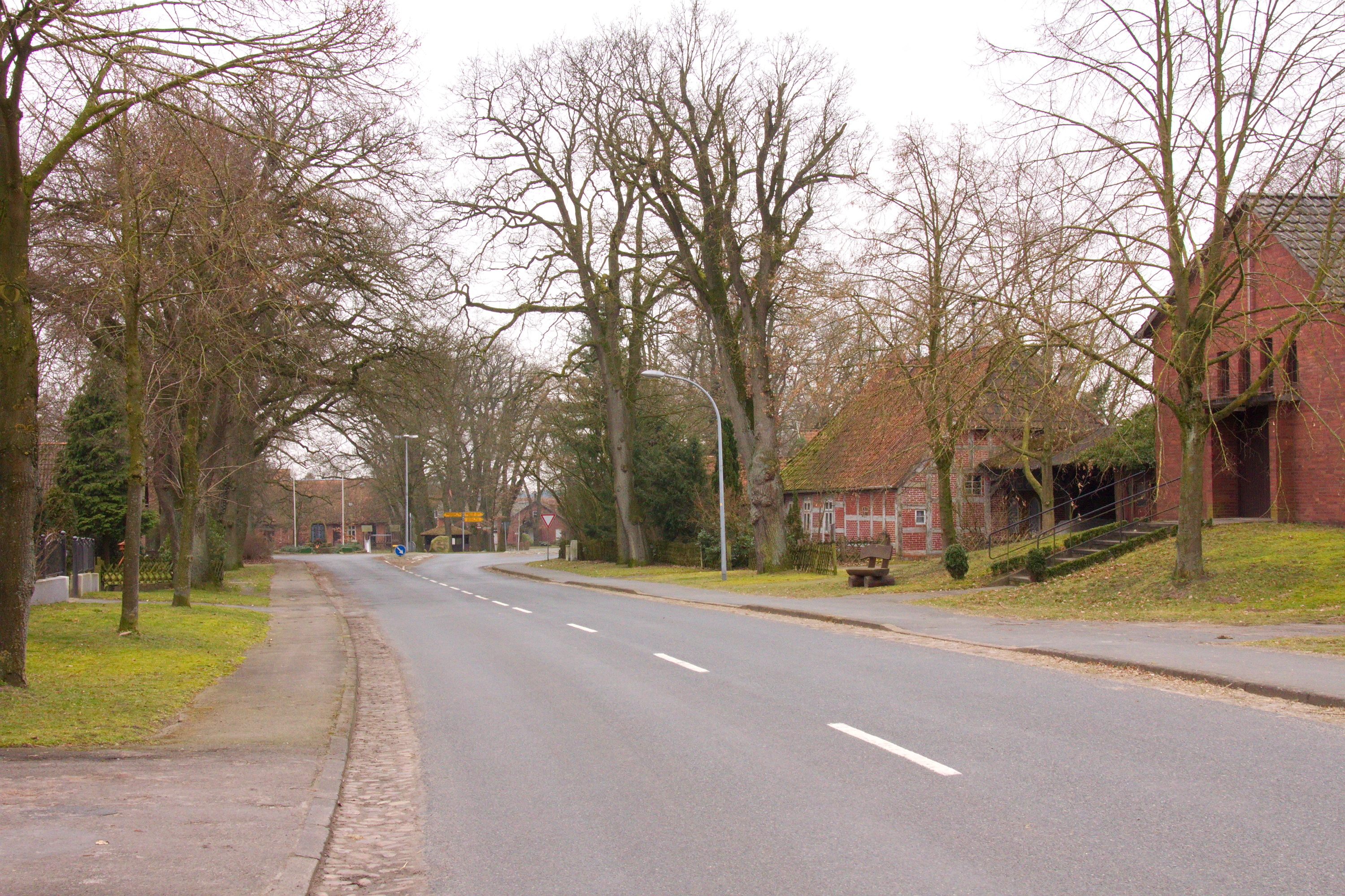 Ortsblick in Neddenaverbergen (Kirchlinteln), Niedersachsen, Deutschland